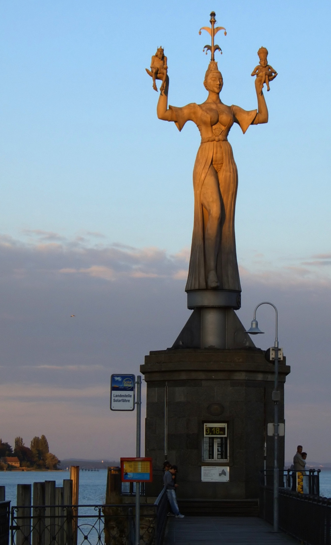 Imperia-Skulptur an der Hafeneinfahrt von Konstanz/Bodensee. Aufgenommen am 25.08.2006 gegen 19:45